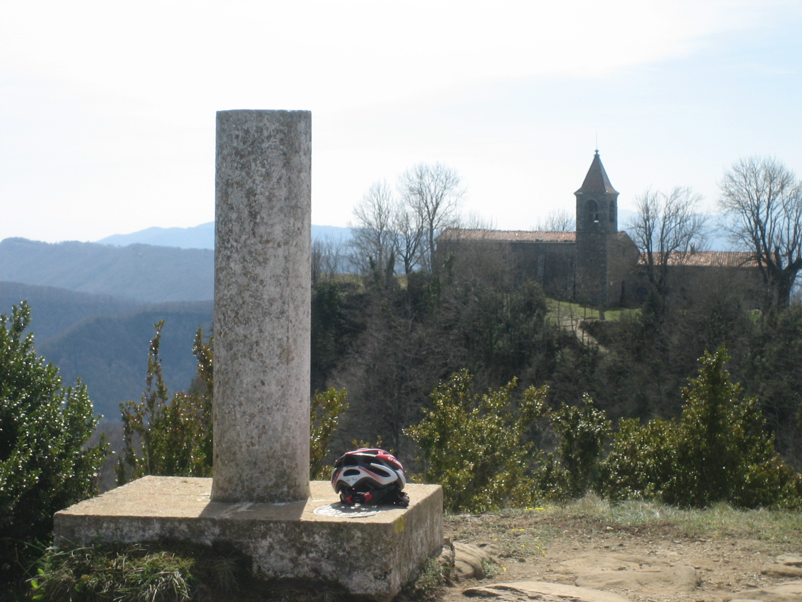 Cabrera (Santa Maria de Corcó) This is a a photo of an emblematic summit in Catalonia, Spain, with id: CE-295093006